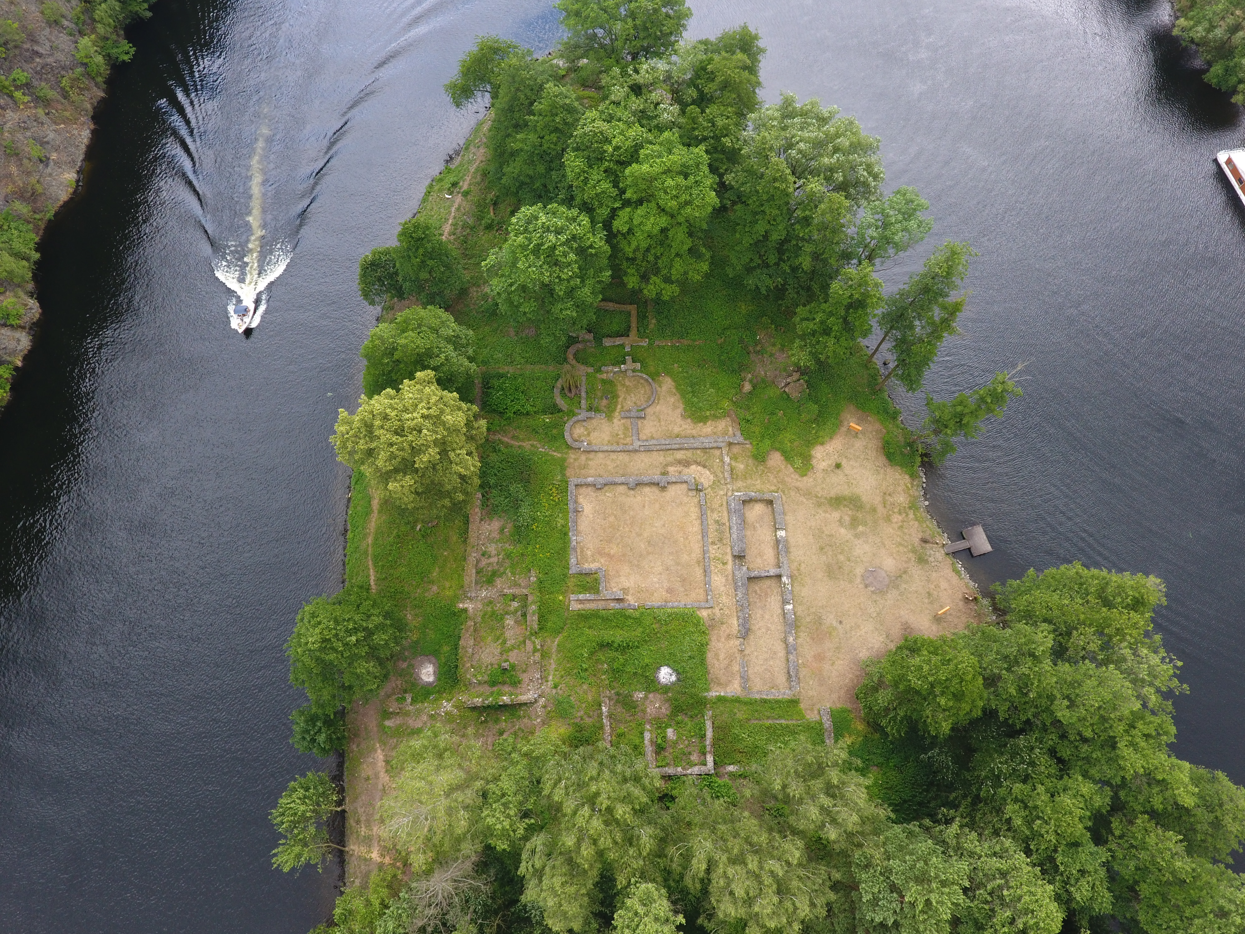 Klášter Stětí sv. Jana Křtitele na Ostrově